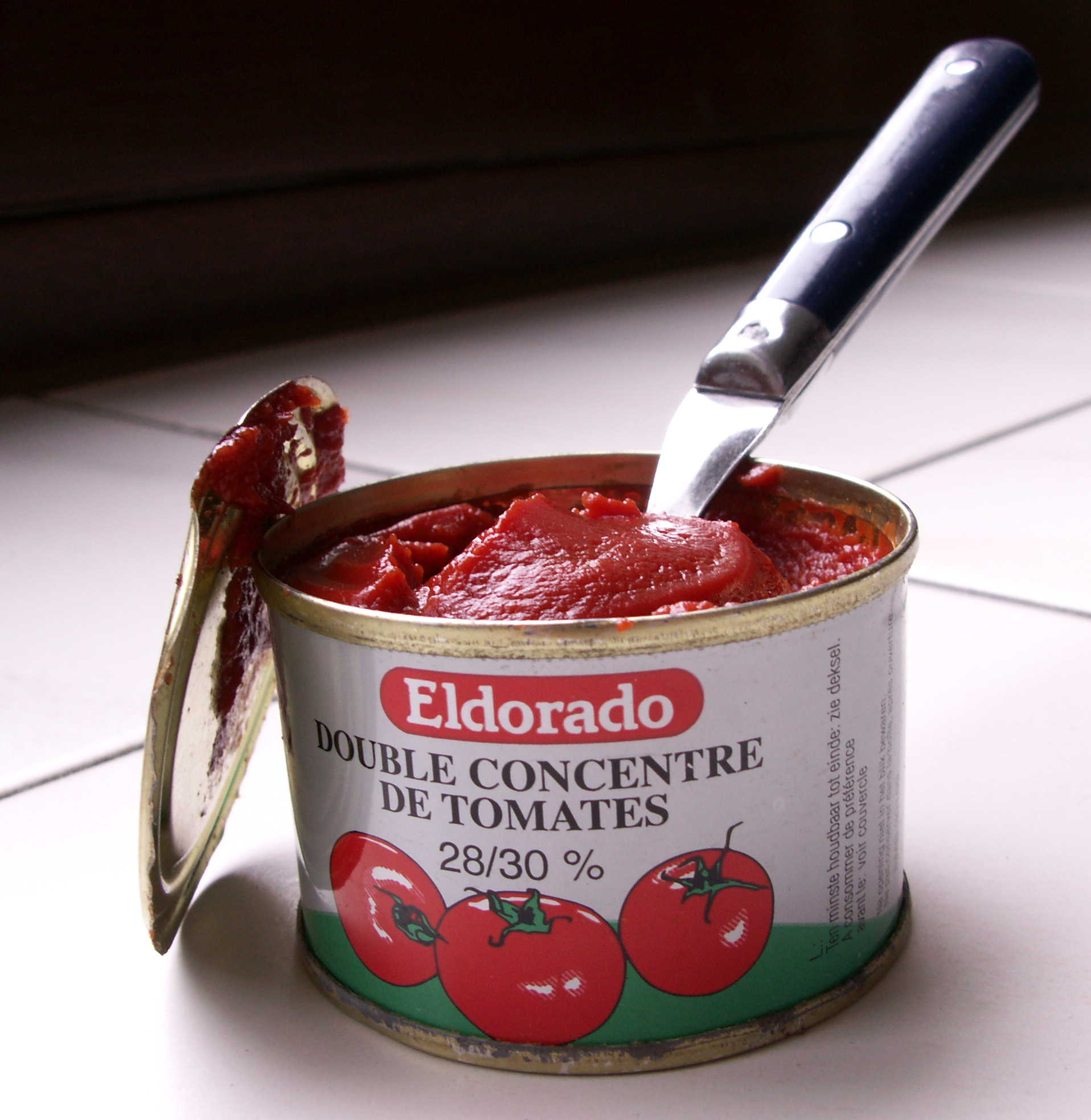 Tomato purée